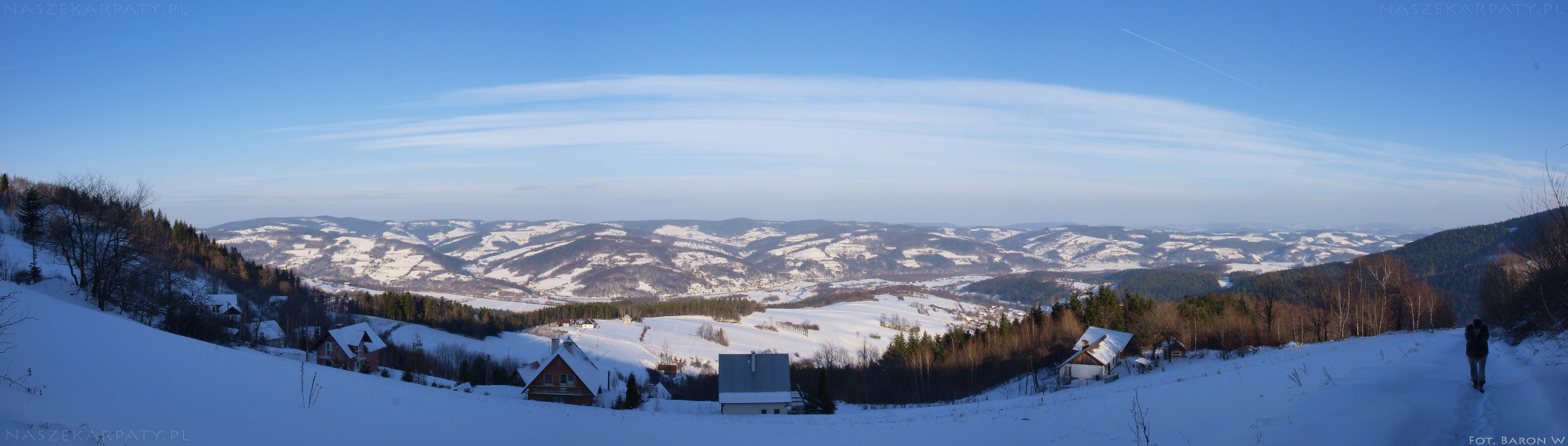 Widok doliny Łososiny z Pasma Łososińskiego z okolic szczytu Korab